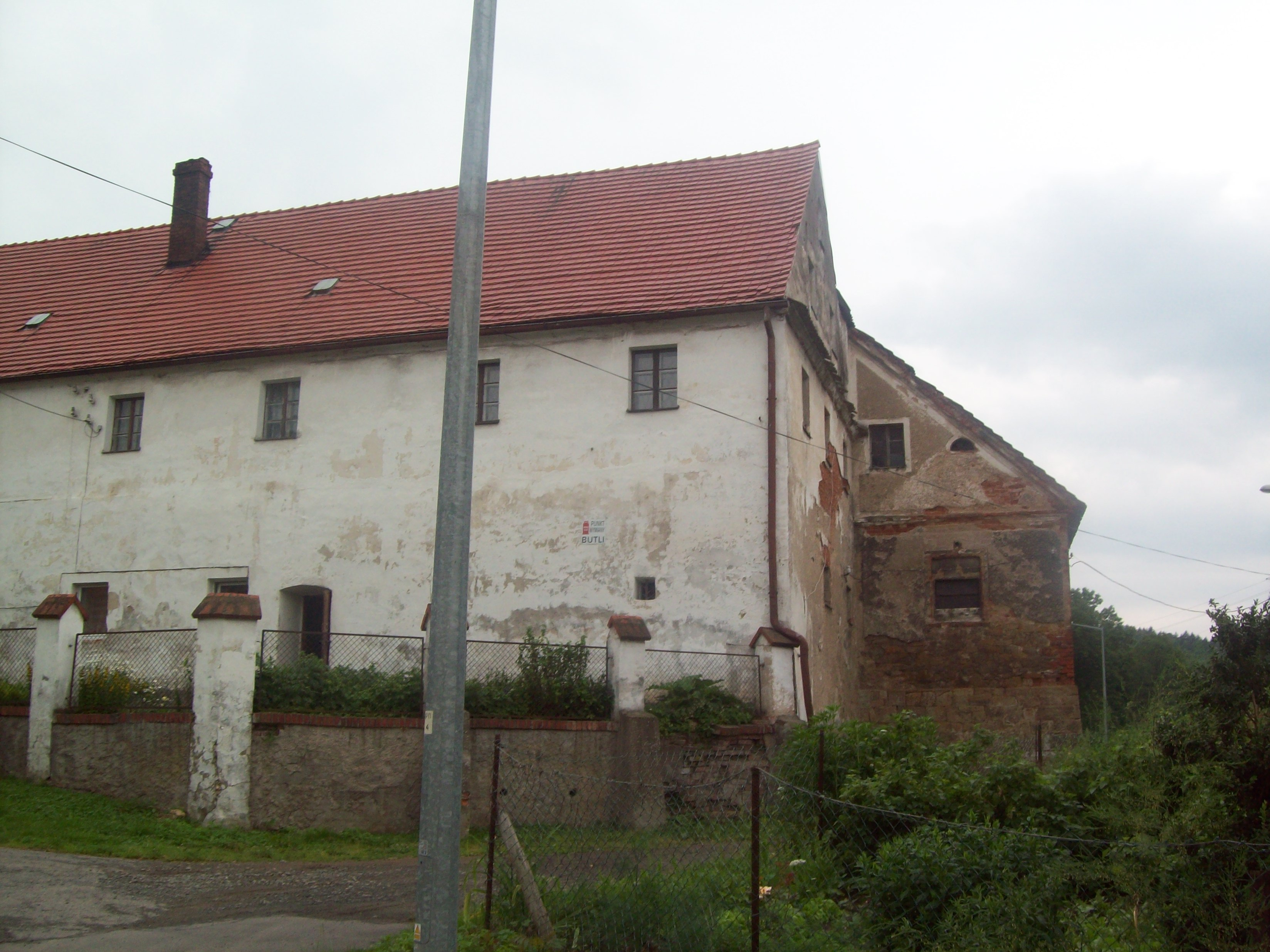 Budynek na Zagórzu w Kłodzku